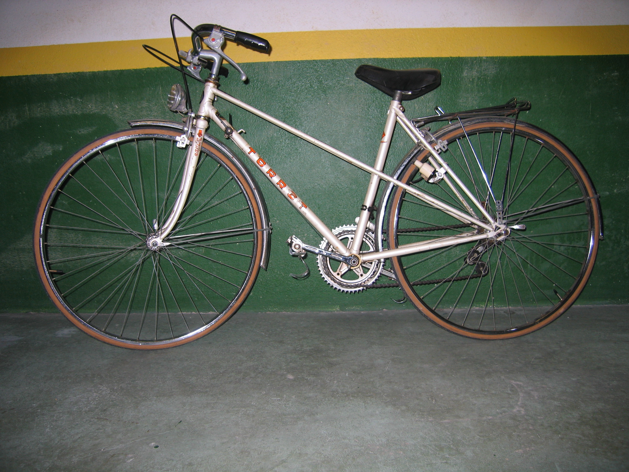 Torrot markako bizikleta. Iriondo S.A. Gasteiz.